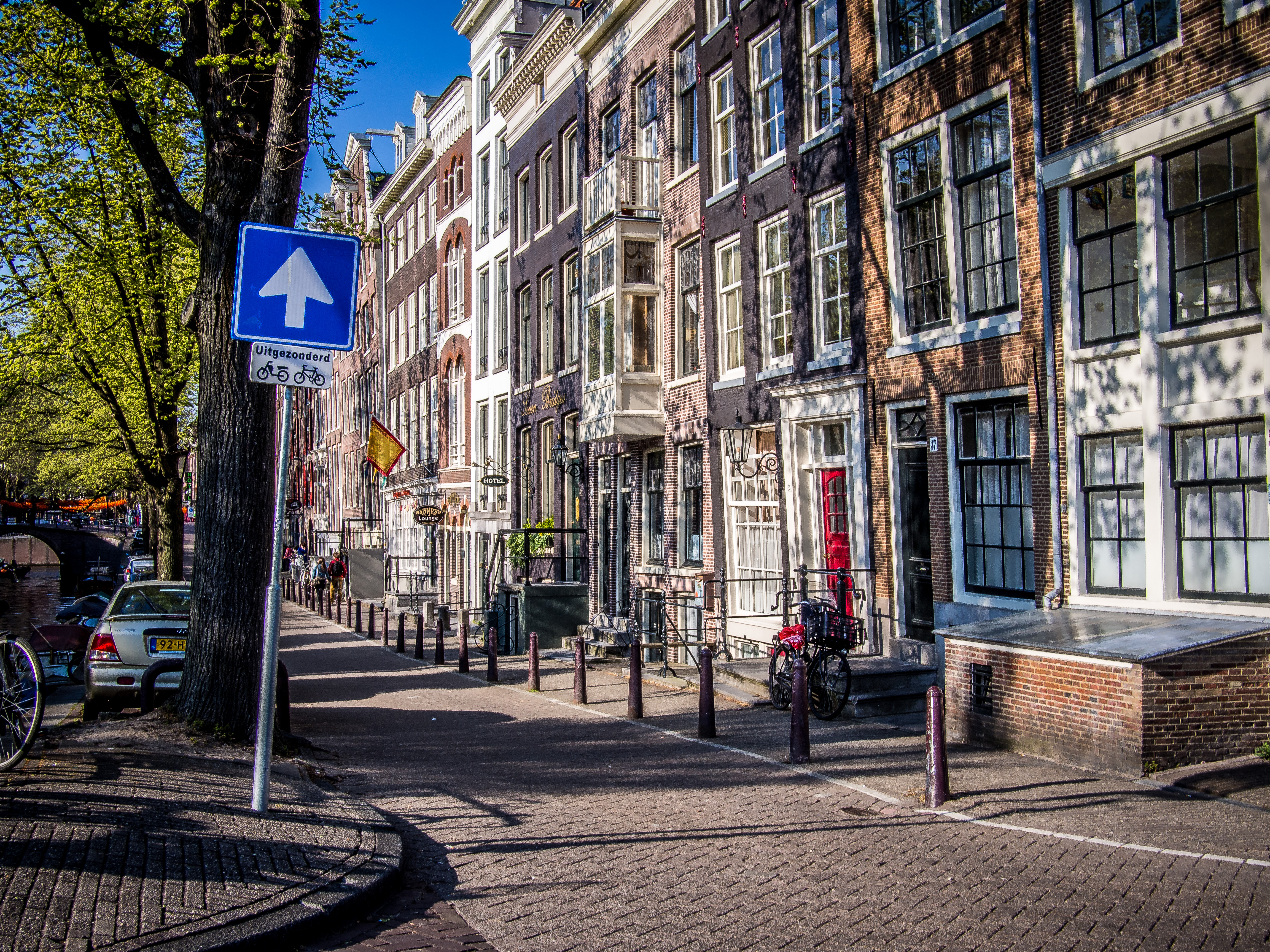 Amsterdam